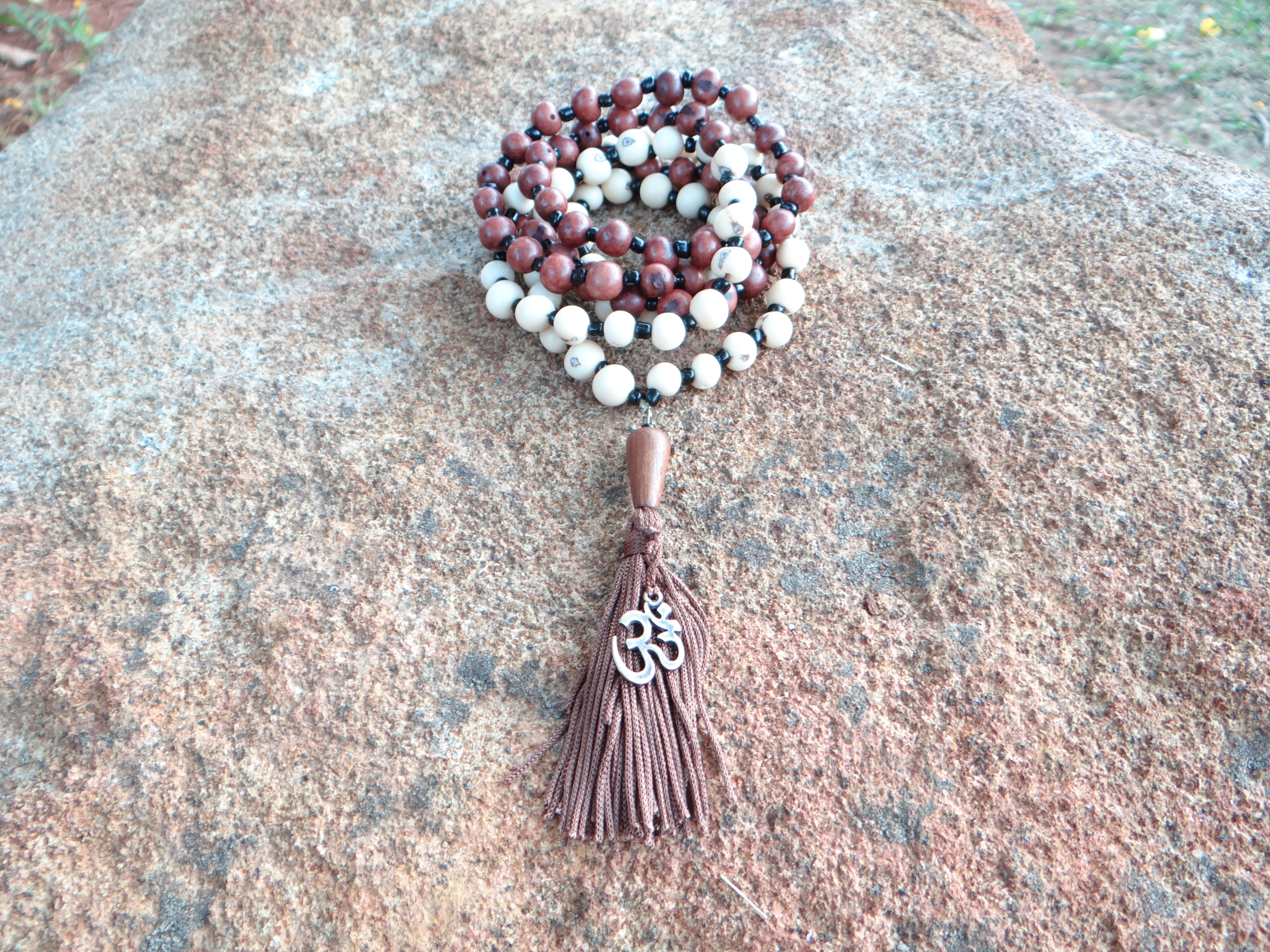 Este é um japamala brasileiro confeccionado com as nossas famosas sementes de açaí que, além de ser um alimento riquíssimo, suas sementes ainda são amplamente usadas no artesanato